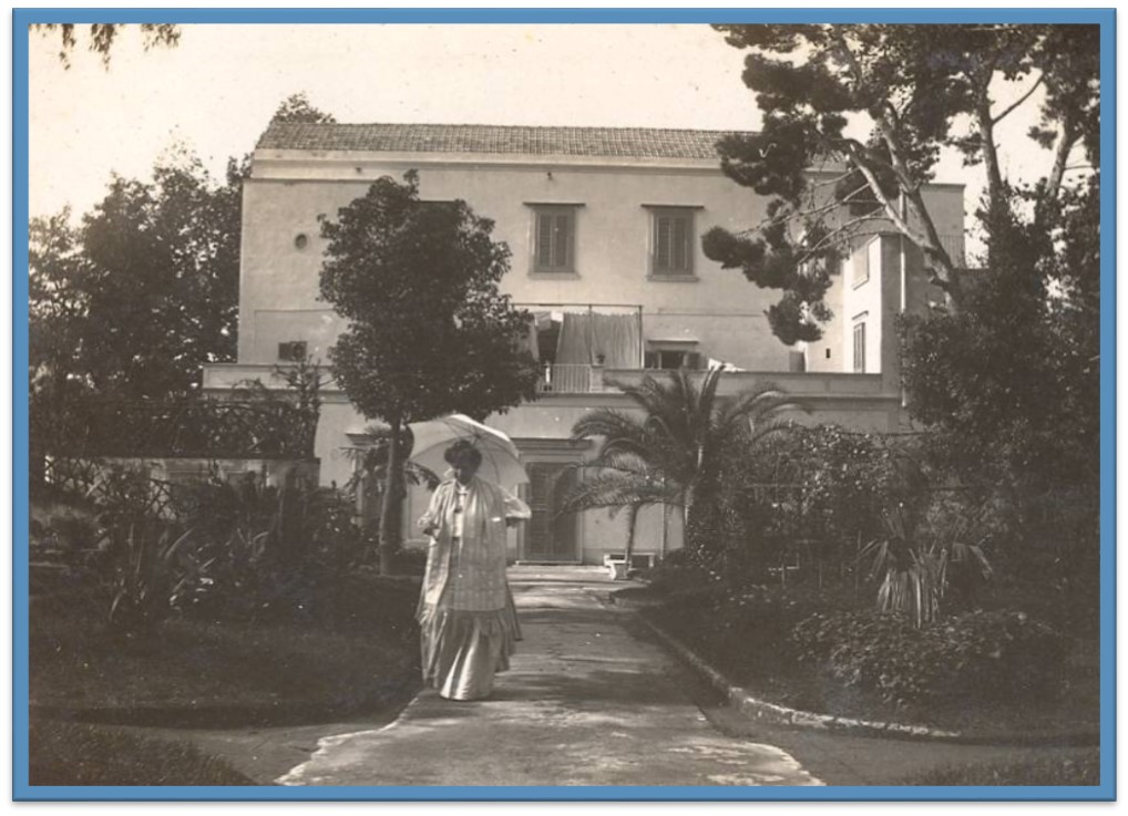 Vista dell'ingresso